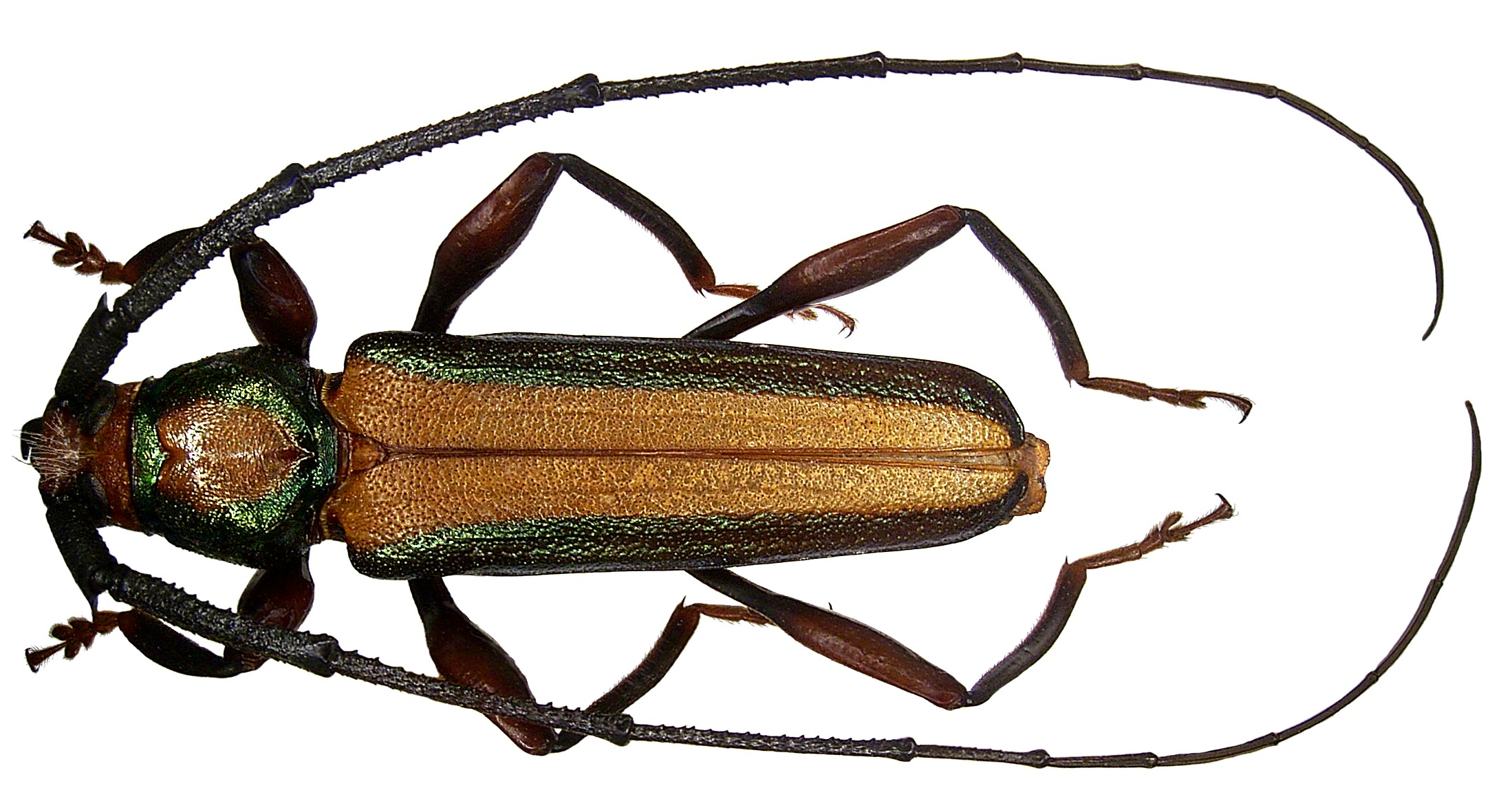 Familie: Cerambycidae Grösse: 39 mm Fundort: Indonesien, Sumatra, 2006 det. A.Weigel, 2007 Foto: U.Schmidt, 2008